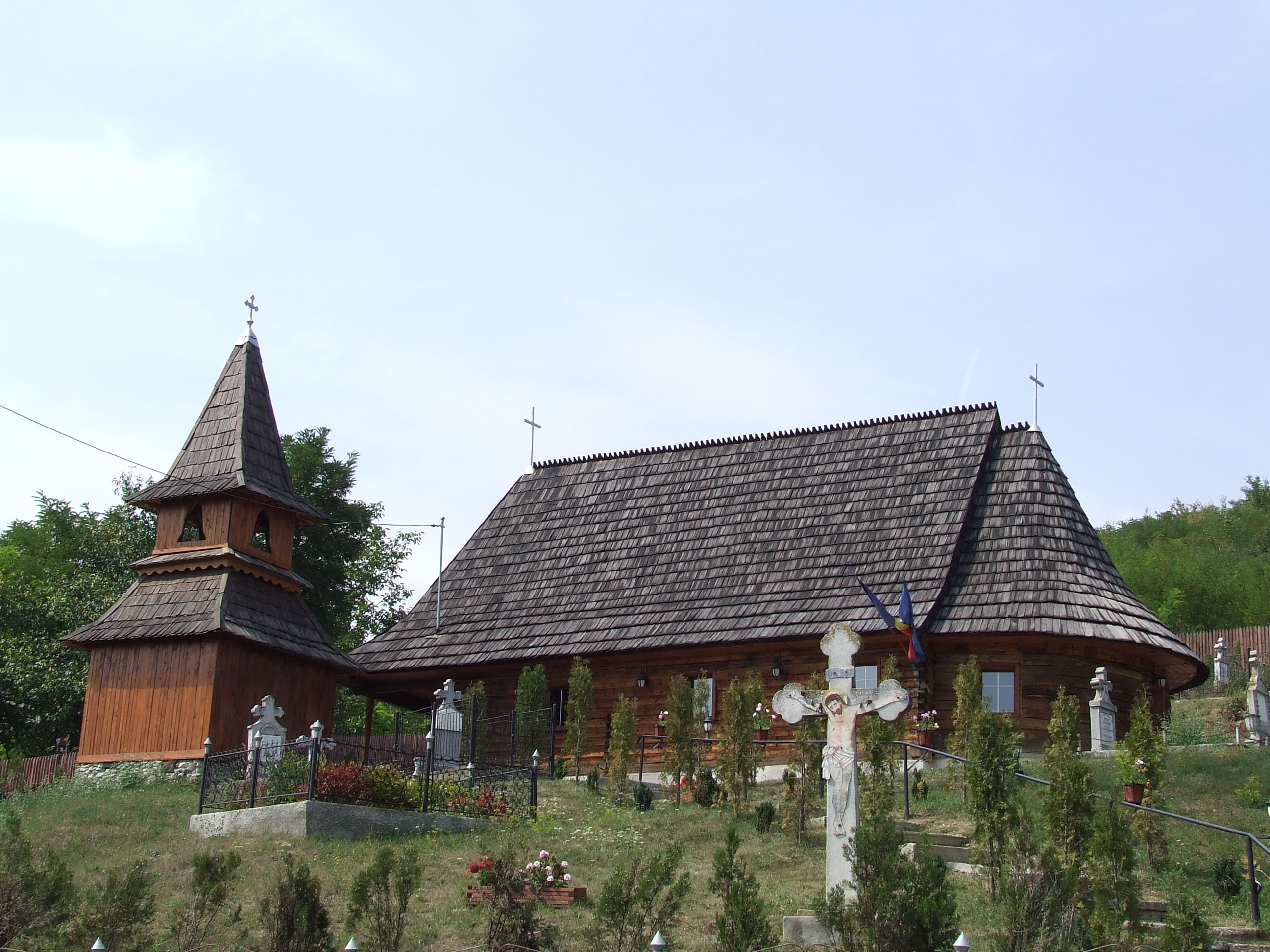 Biserica de lemn din Abuş, judeţul Mureş.